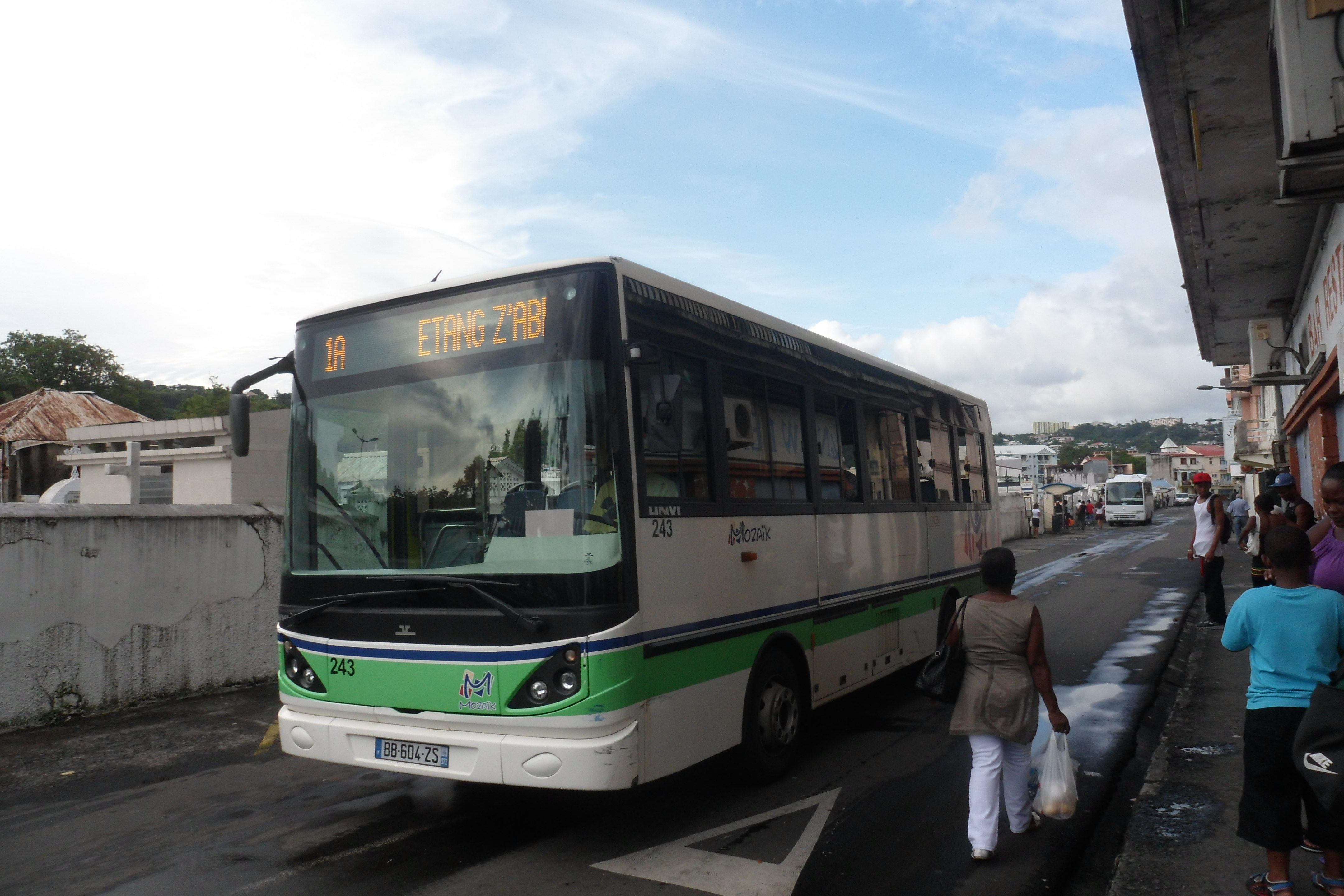 Un MAN UNVI de la ligne 1A à Aliker. A partir de Septembre 2012, la 1A deviendra la 31.